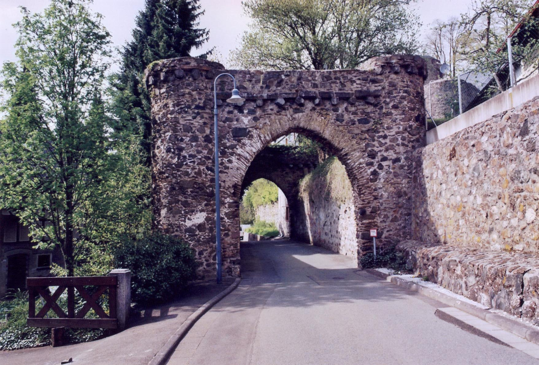 Burg Hohensolms, Toranlage im Ort